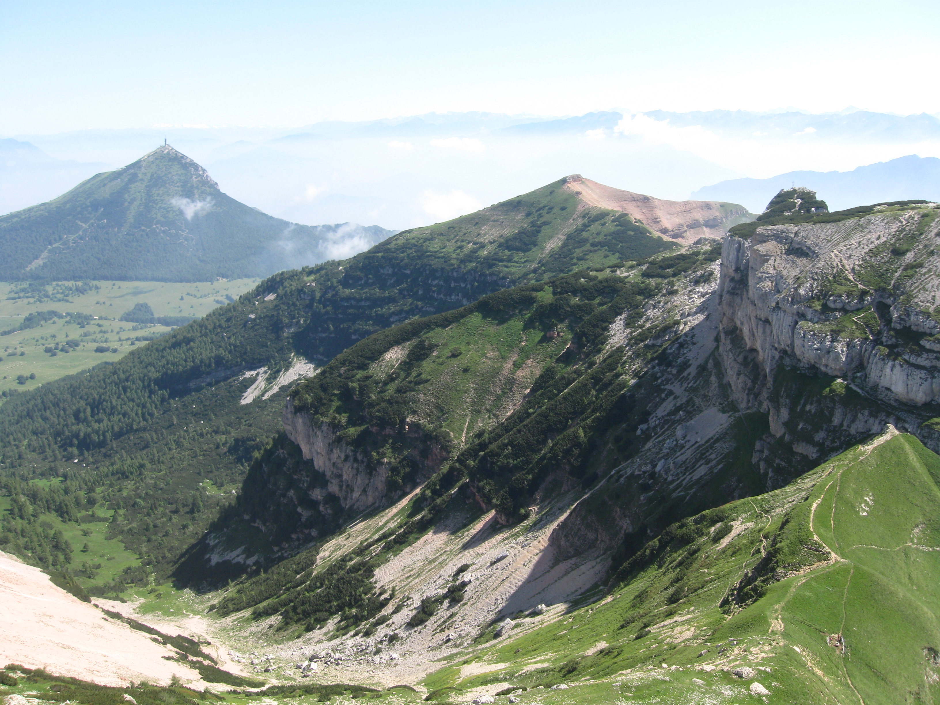 Riserva naturale integrale delle Tre Cime del Monte Bondone (Q3936832)